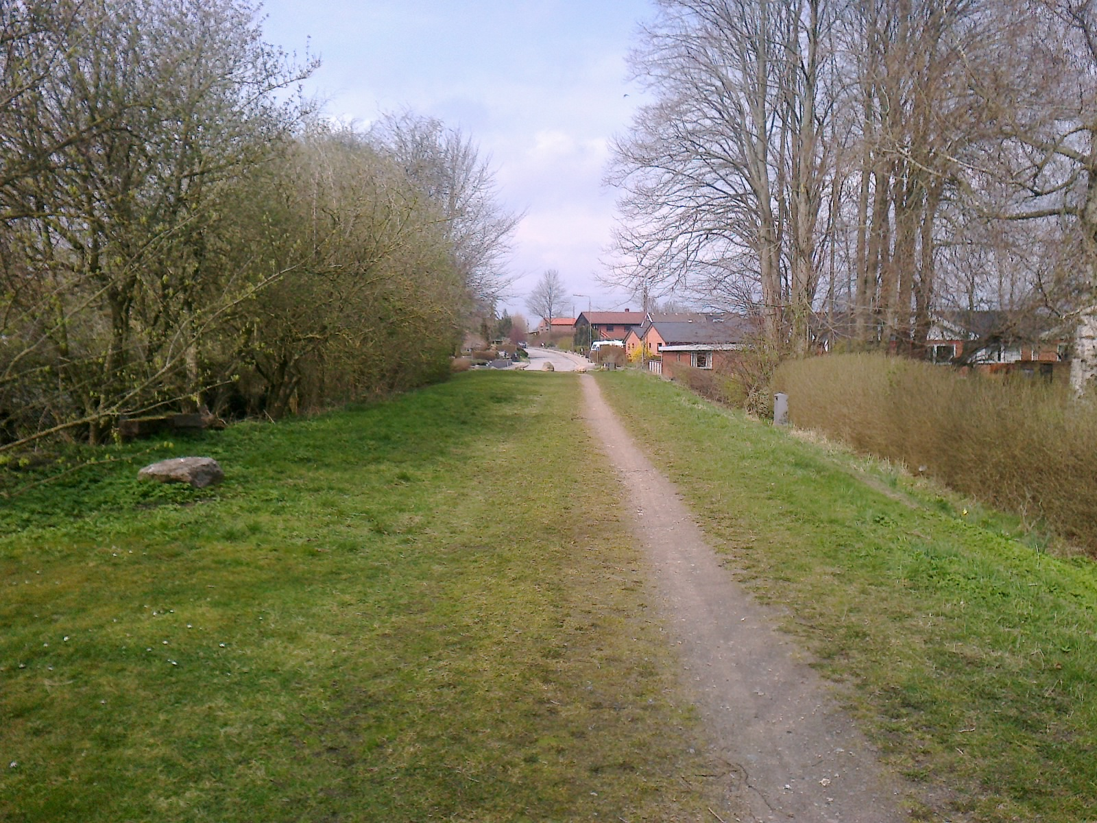 Inde i Lund fortsætter stien i Toftevej, der er anlagt på tracéet